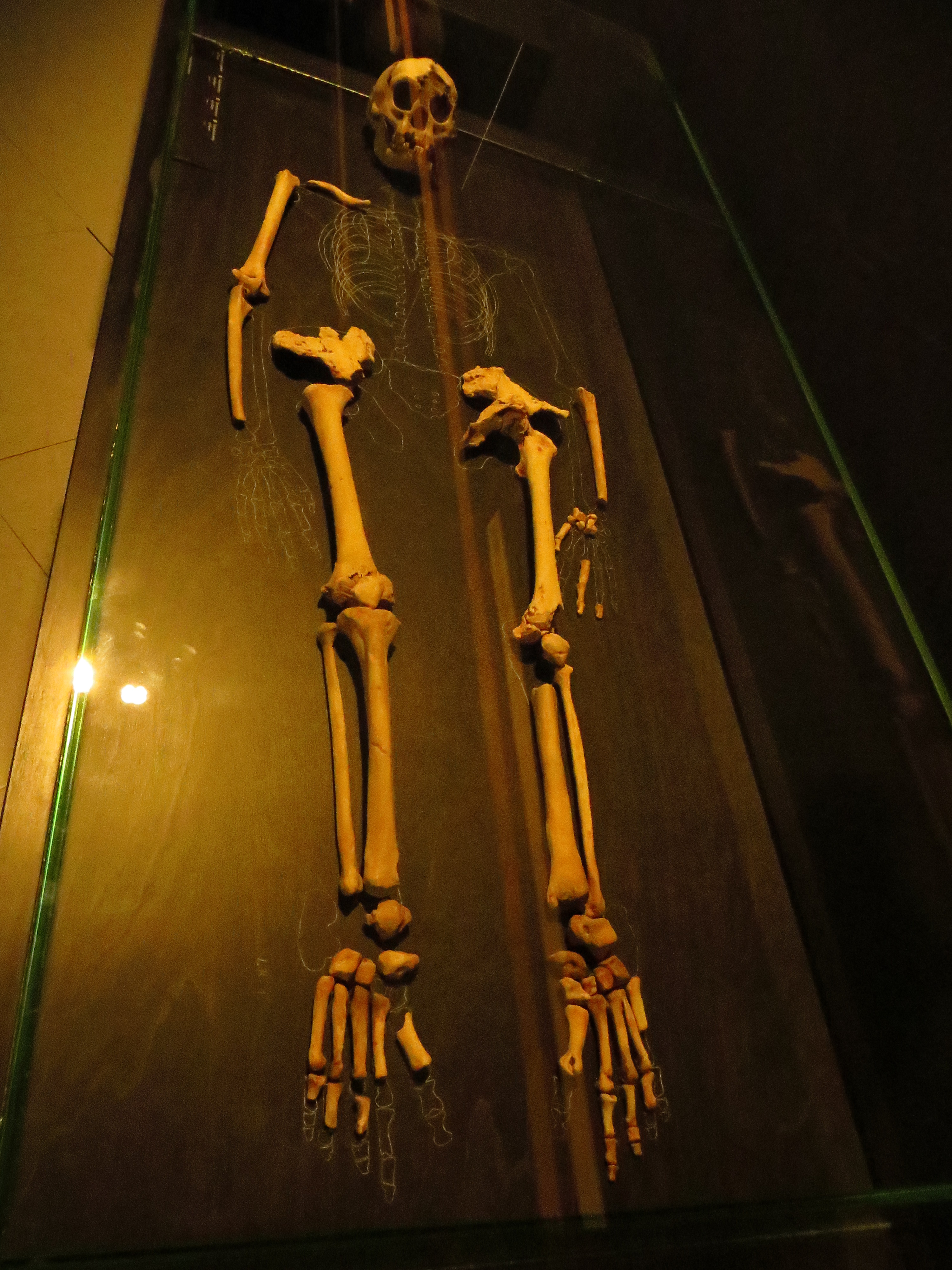 Took The picture at Royal Belgian Institute of Natural Sciences, Brussels